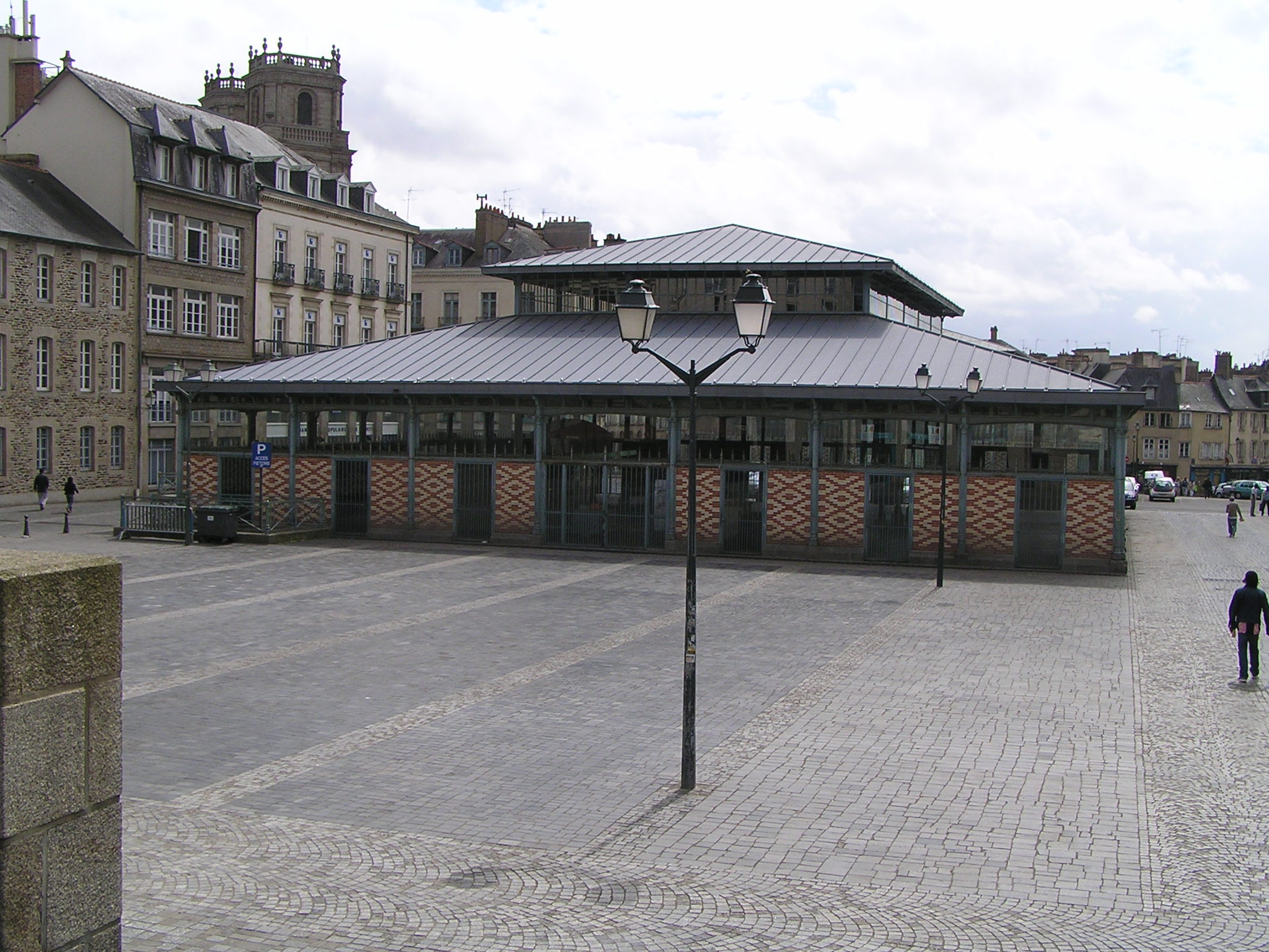 Place des lices et Halles Martenot, marché de Rennes